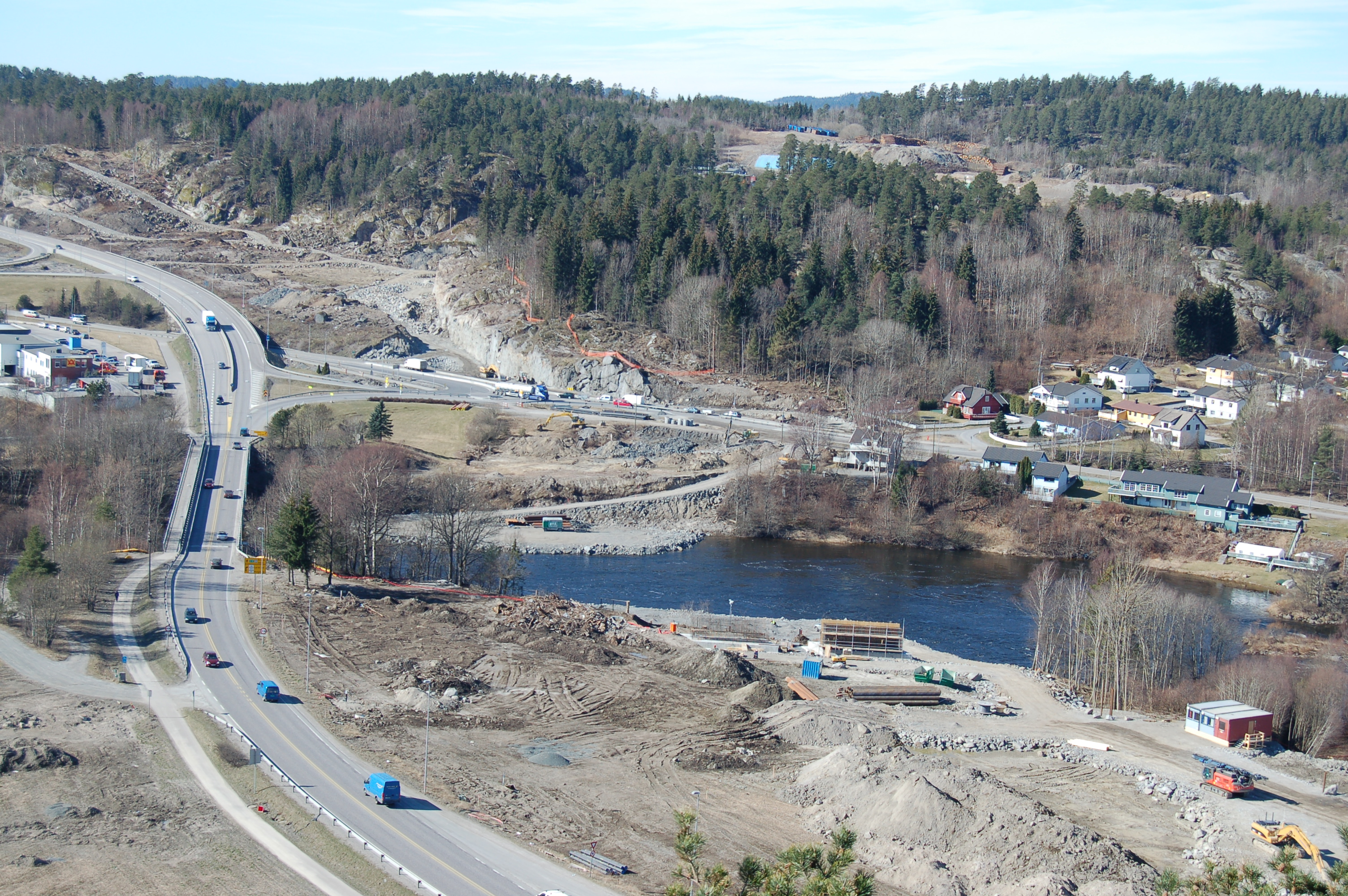 Bommestad bru (den gamle) ved byggestart av ny, 2/4 2007